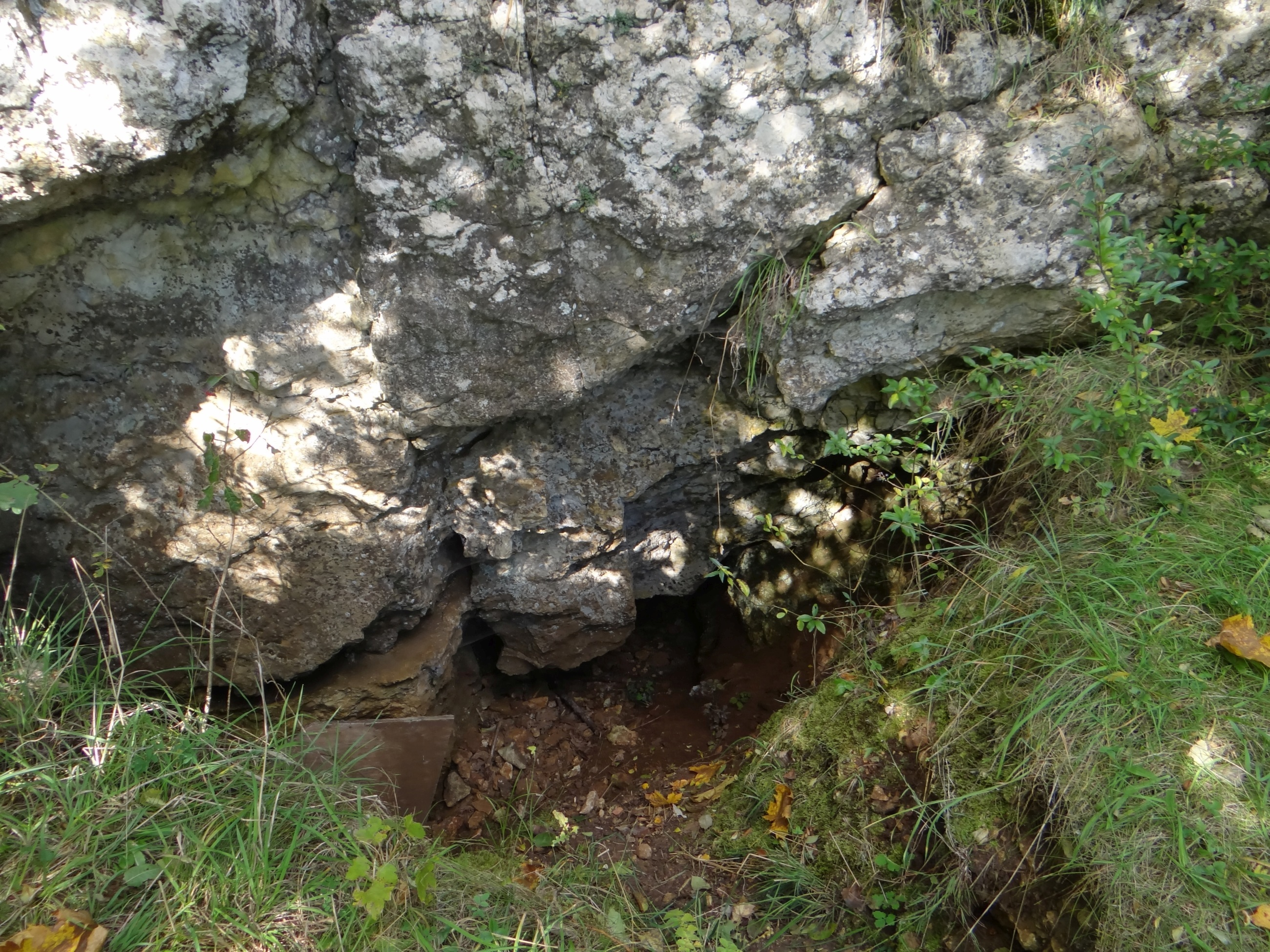 Jaskinia pod Nyżą